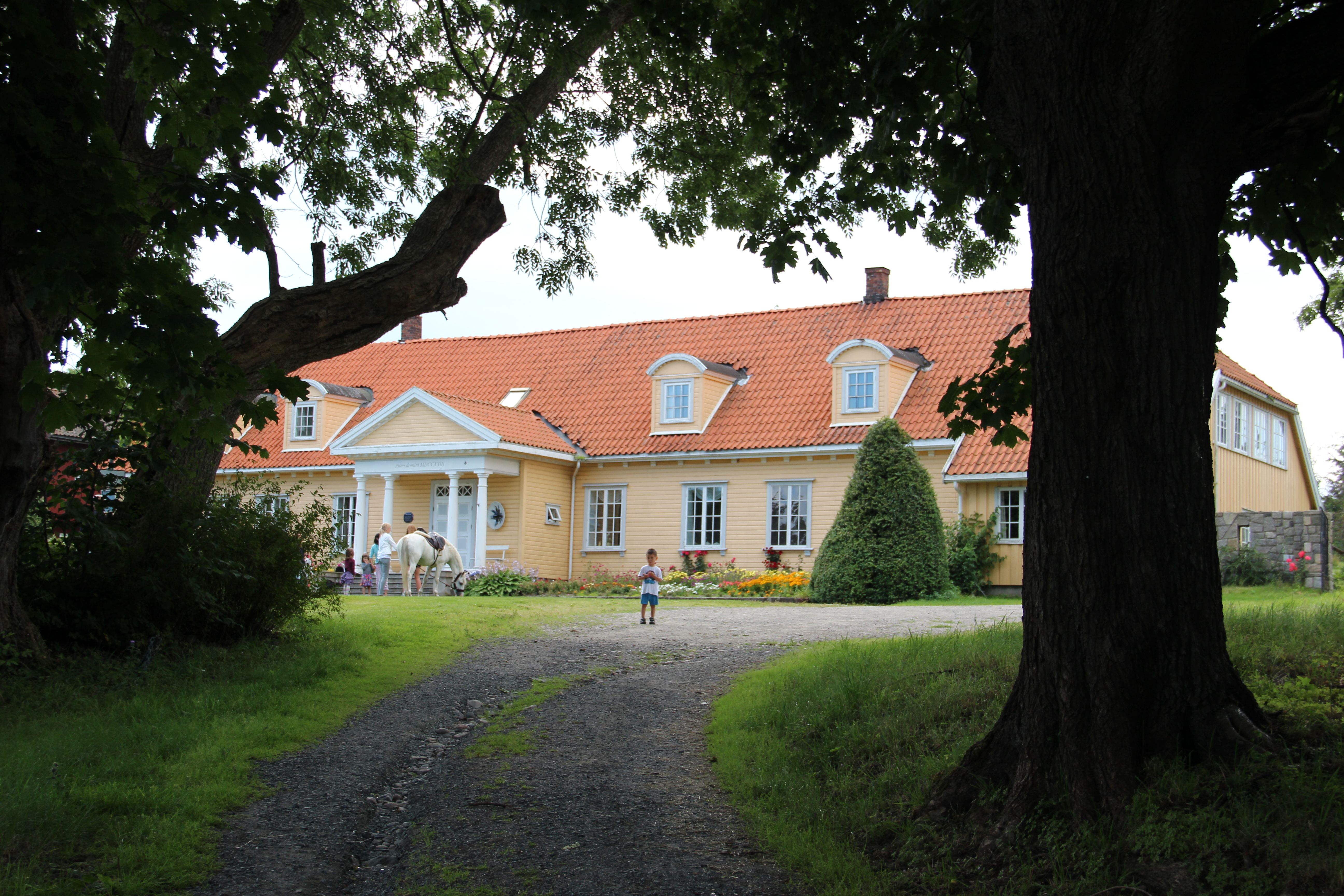 Hovedbygningen